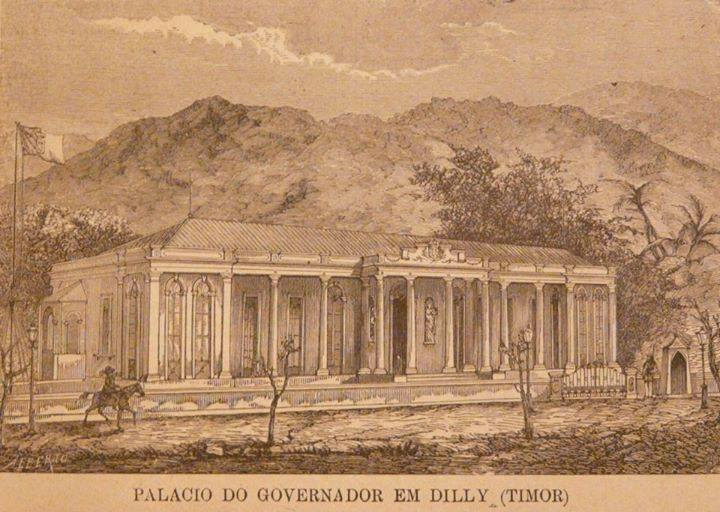 Gouverneurspalast in Dili. Portugiesische Zeichnung.